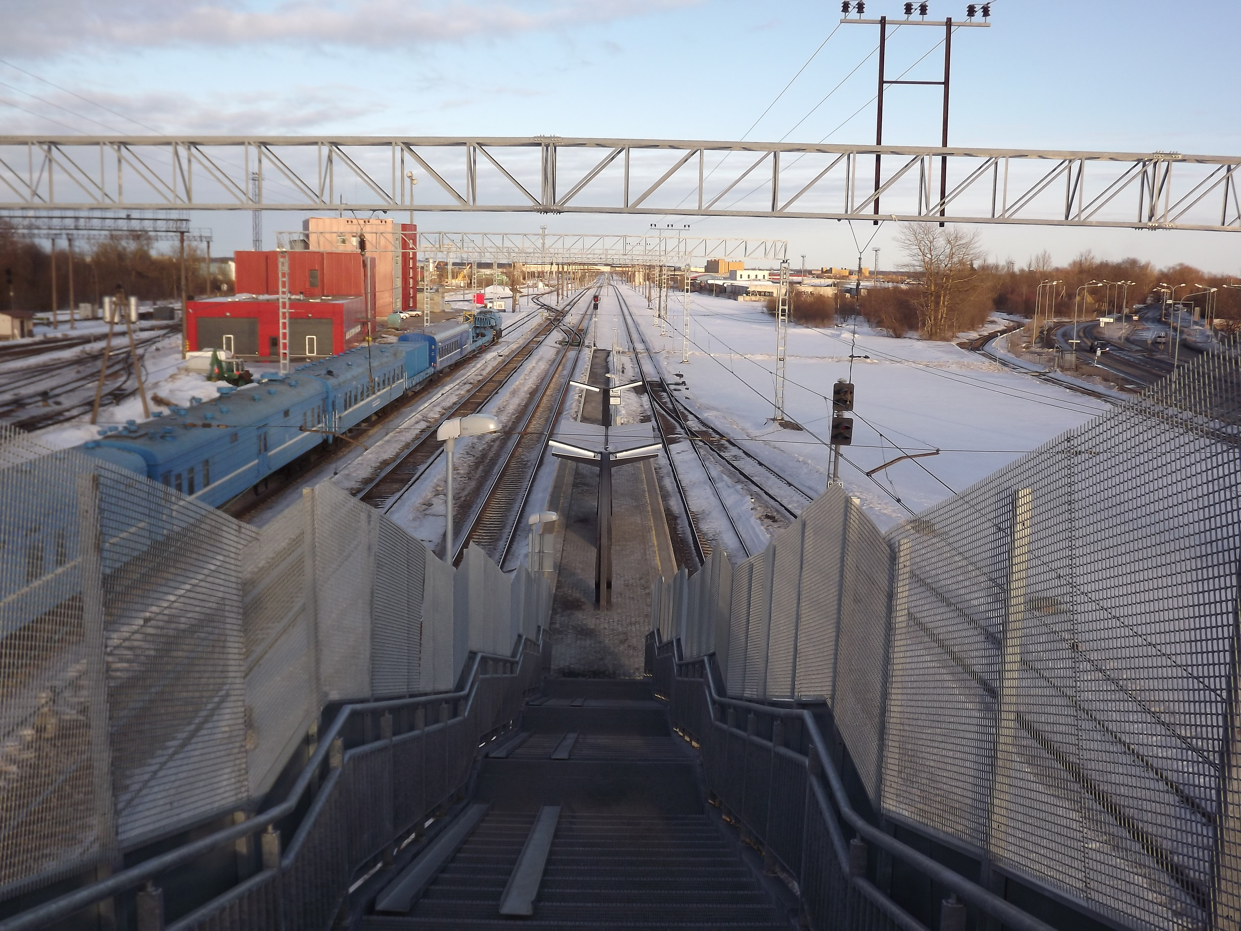 Vesse raudteepeatus